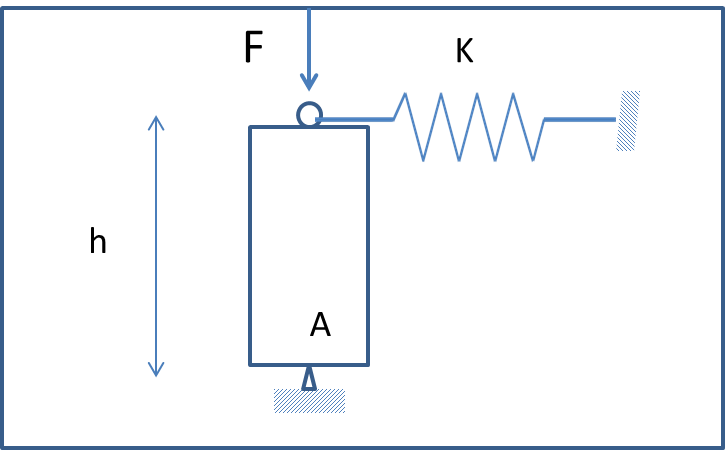 Fig.2